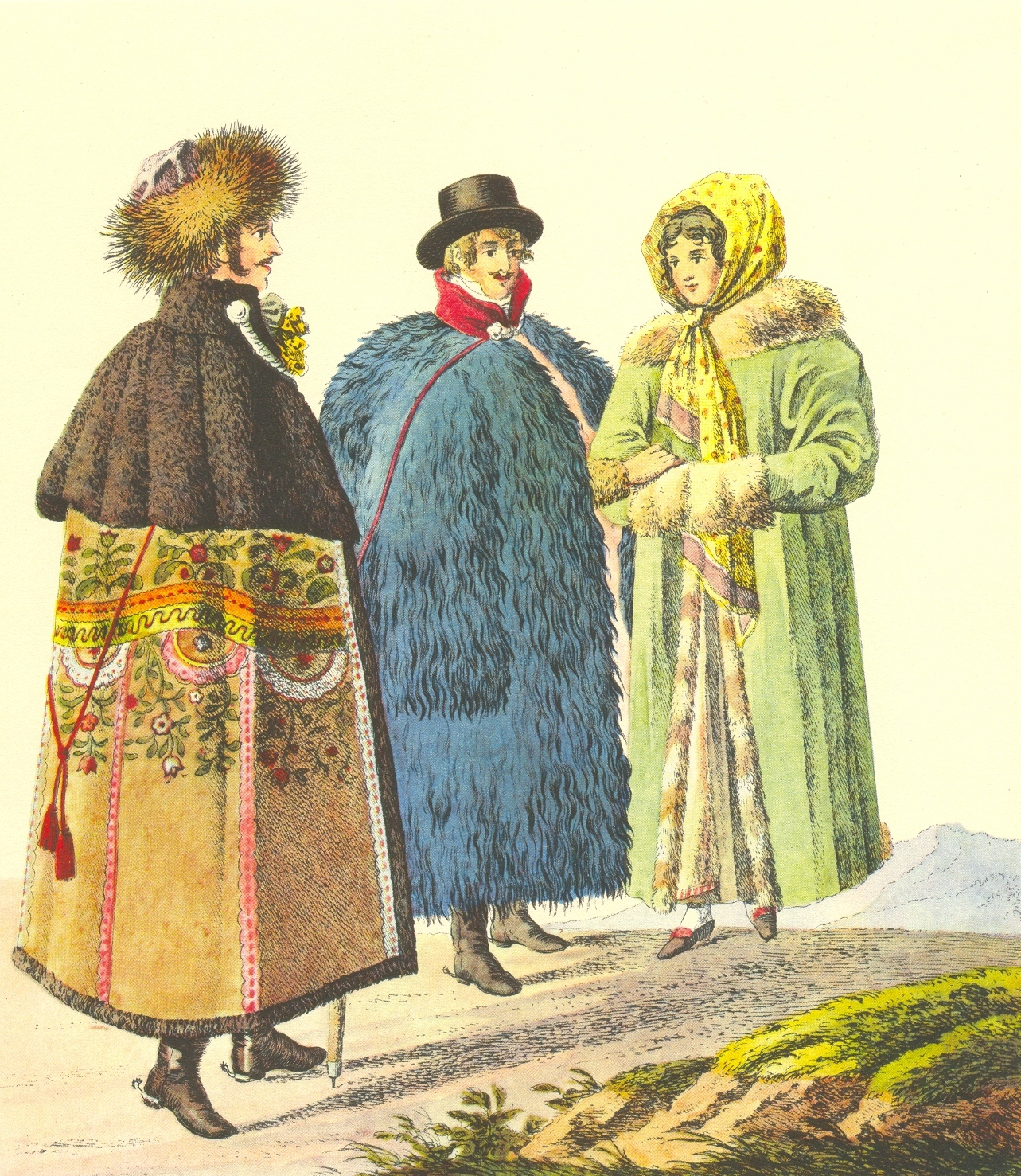 Különböző magyar bundák